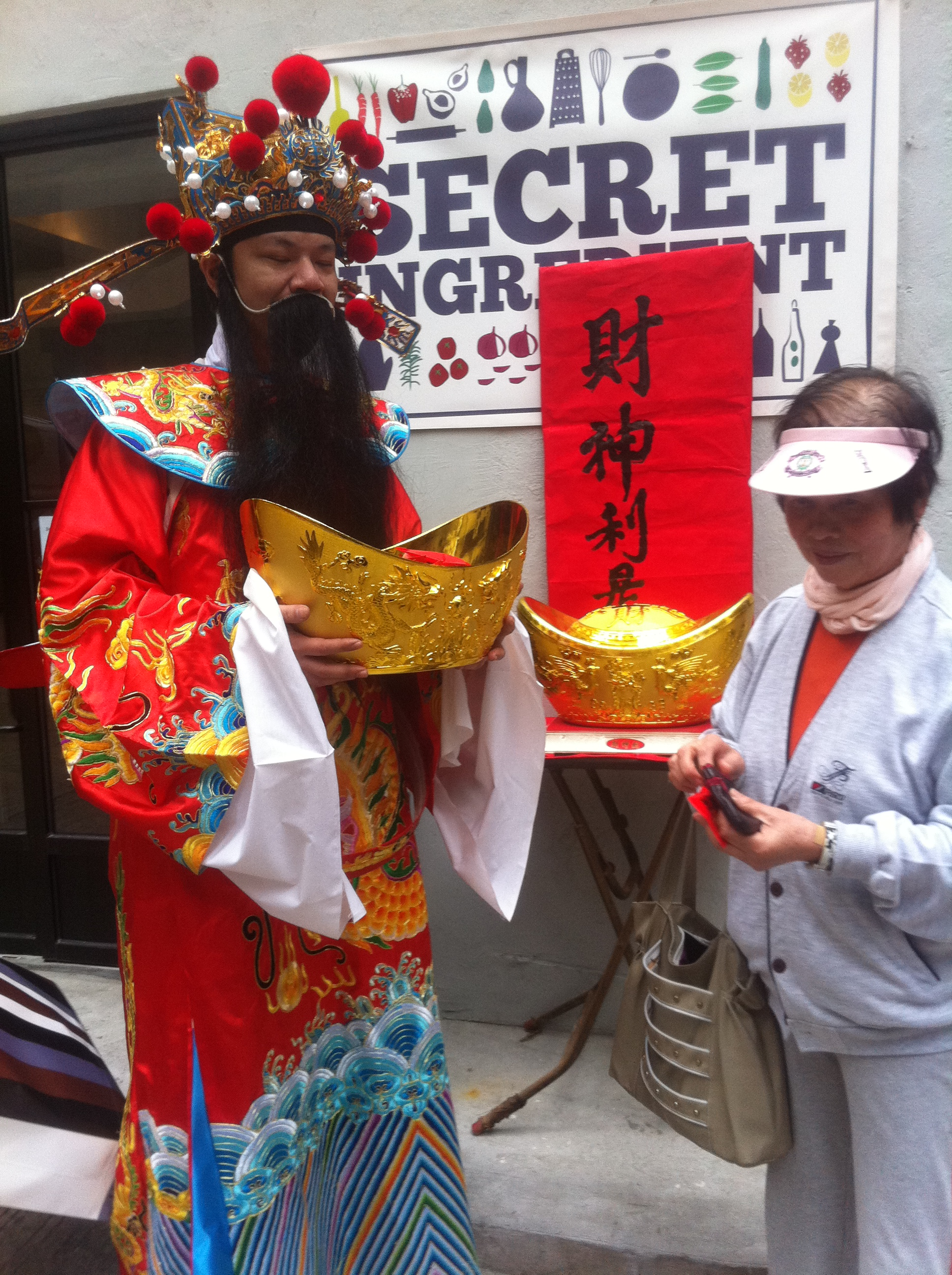 中文（香港）: 上環 觀音借庫 財神到